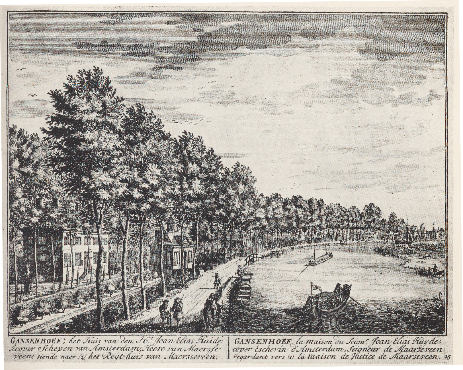 Buitenplaats Gansenhoef aan het Zandpad te Maarssen op een gravure door Stoopendaal in 1719 met onder meer een trekschuit die wordt gejaagd.